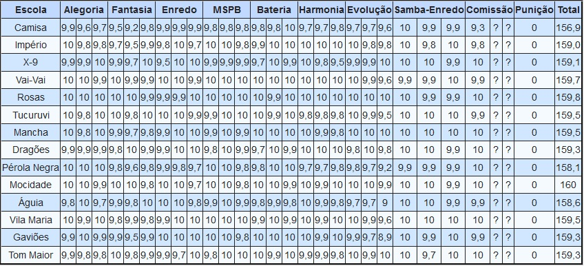 Resultados do Carnaval de São Paulo - 2012